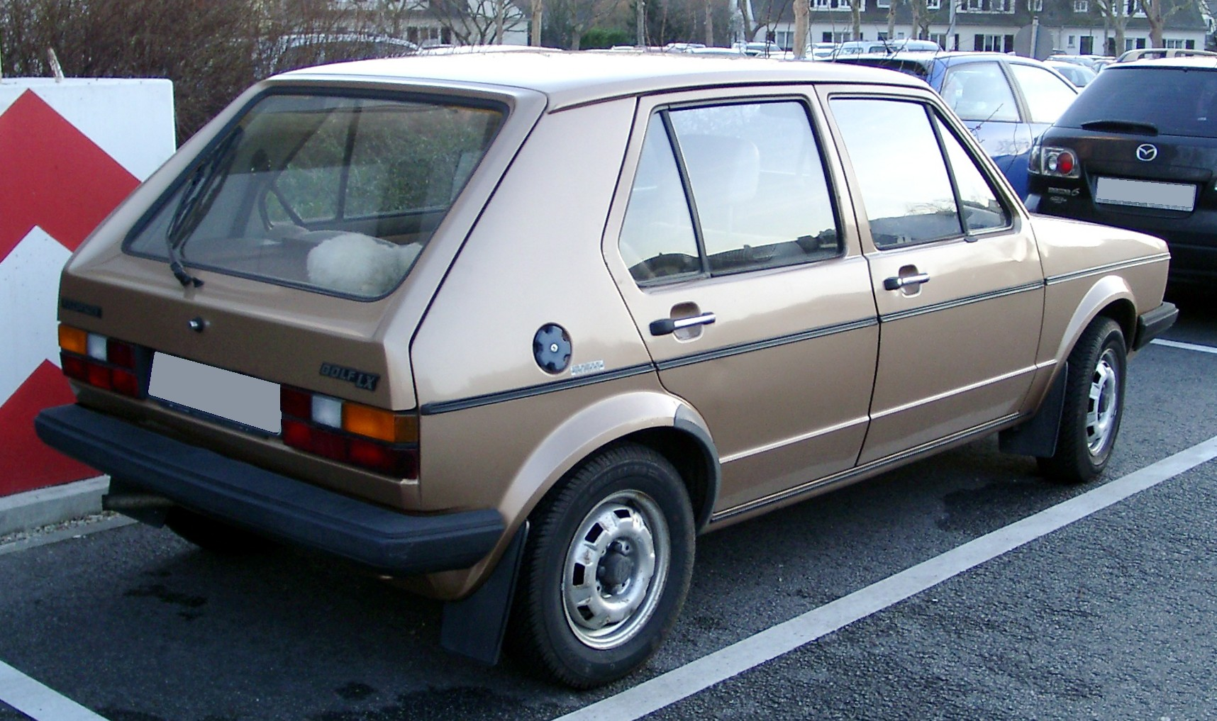 VW Golf I